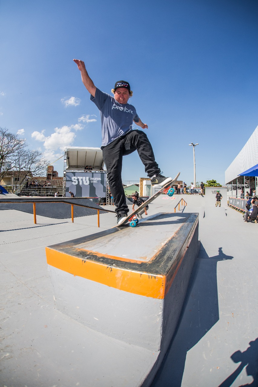 Sapiranda